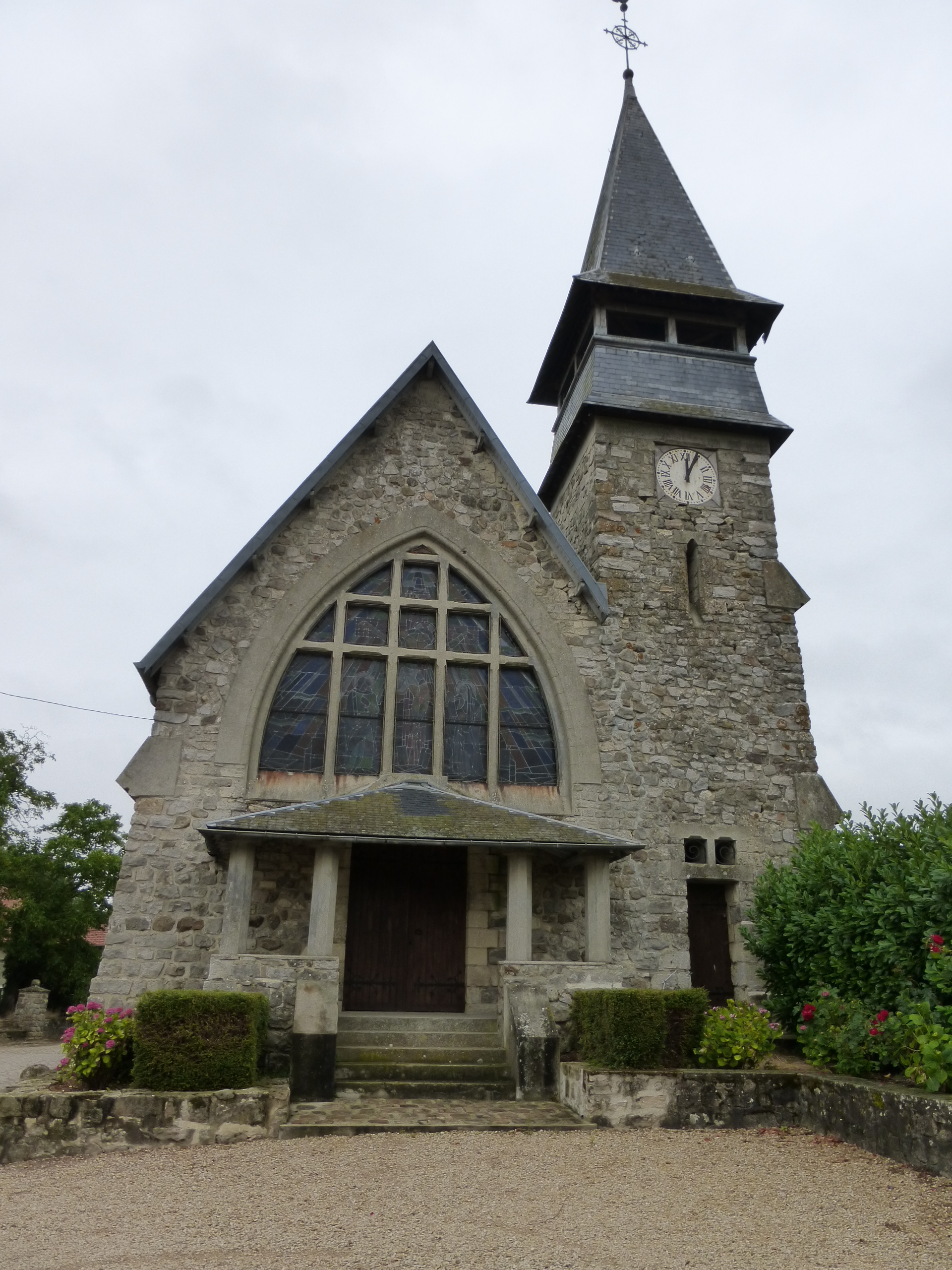 Eglise de Passy en Valois - Architecte : Henry Faucheur